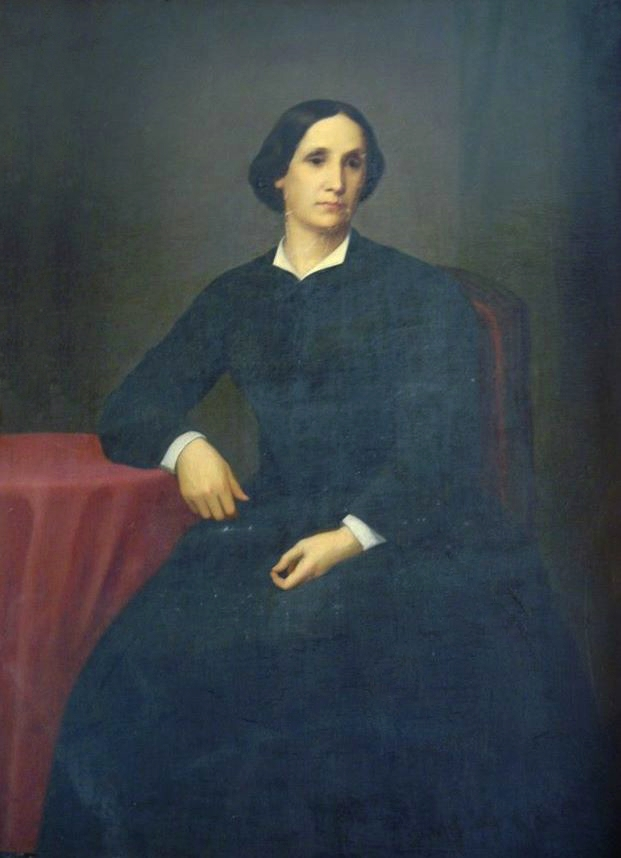 Doña Mercedes Jijón de Vivanco, esposa del primer presidente ecuatoriano, Juan José Flores, y por tanto primera dama de la nación.